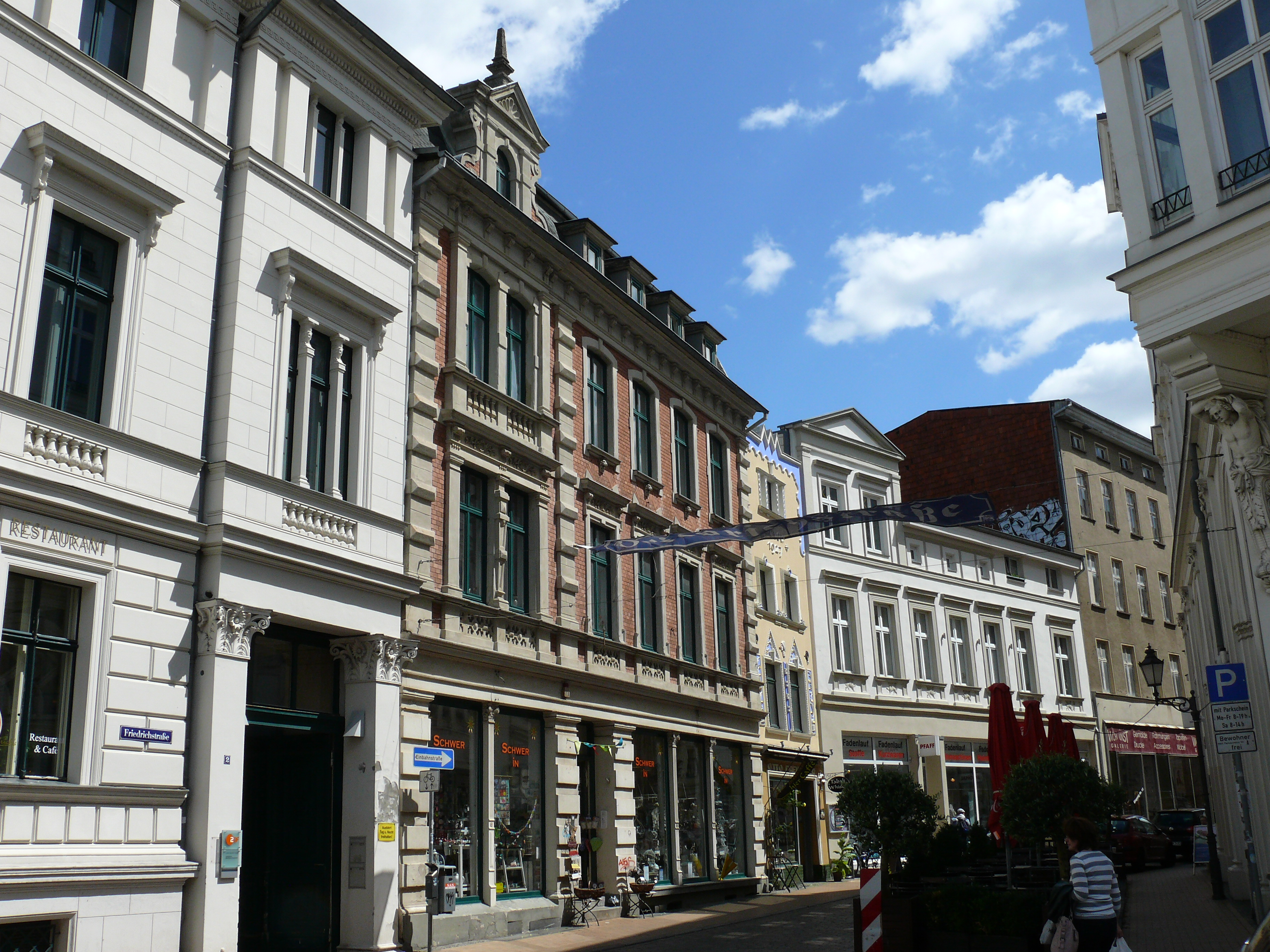 Das Gebäude "Friedrichstraße 4" in Schwerin.